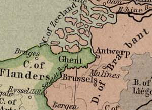 Antwerpen 1477 Historical map of Antwerpen